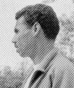 Abdelaziz Ben Tifour pendant la tournée de l'équipe du FLN de football.